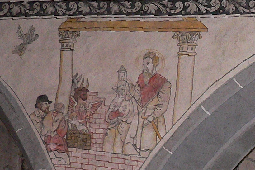 Evangelische Kirche St. Laurentius in Dassel, Niedersachsen, Deutschland - Protestantische Renaissancemalerei (Secco): "The Adoration of the Shepherds" von 1577